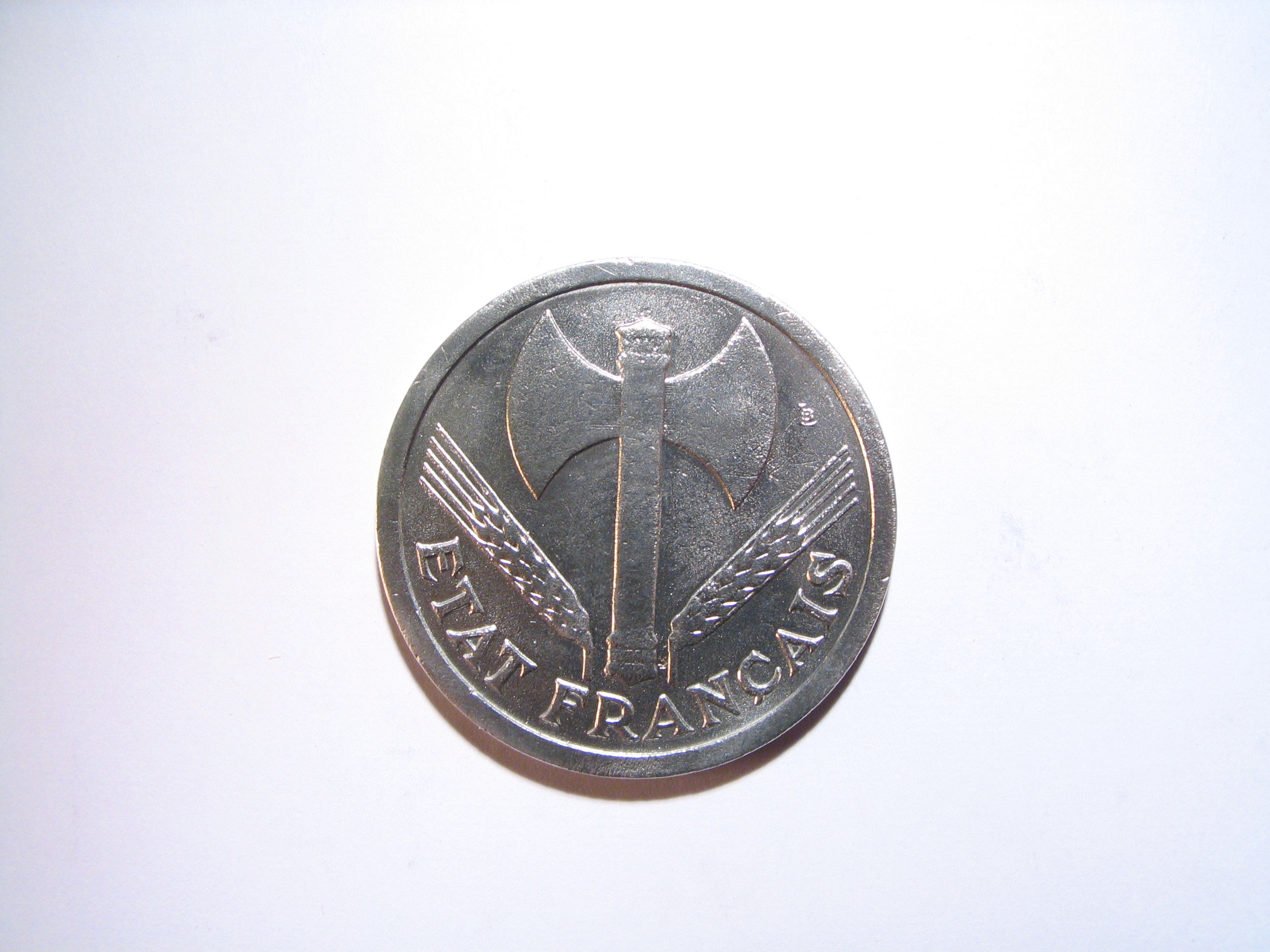 Piece de deux francs 1943, État Français, régime de Vichy